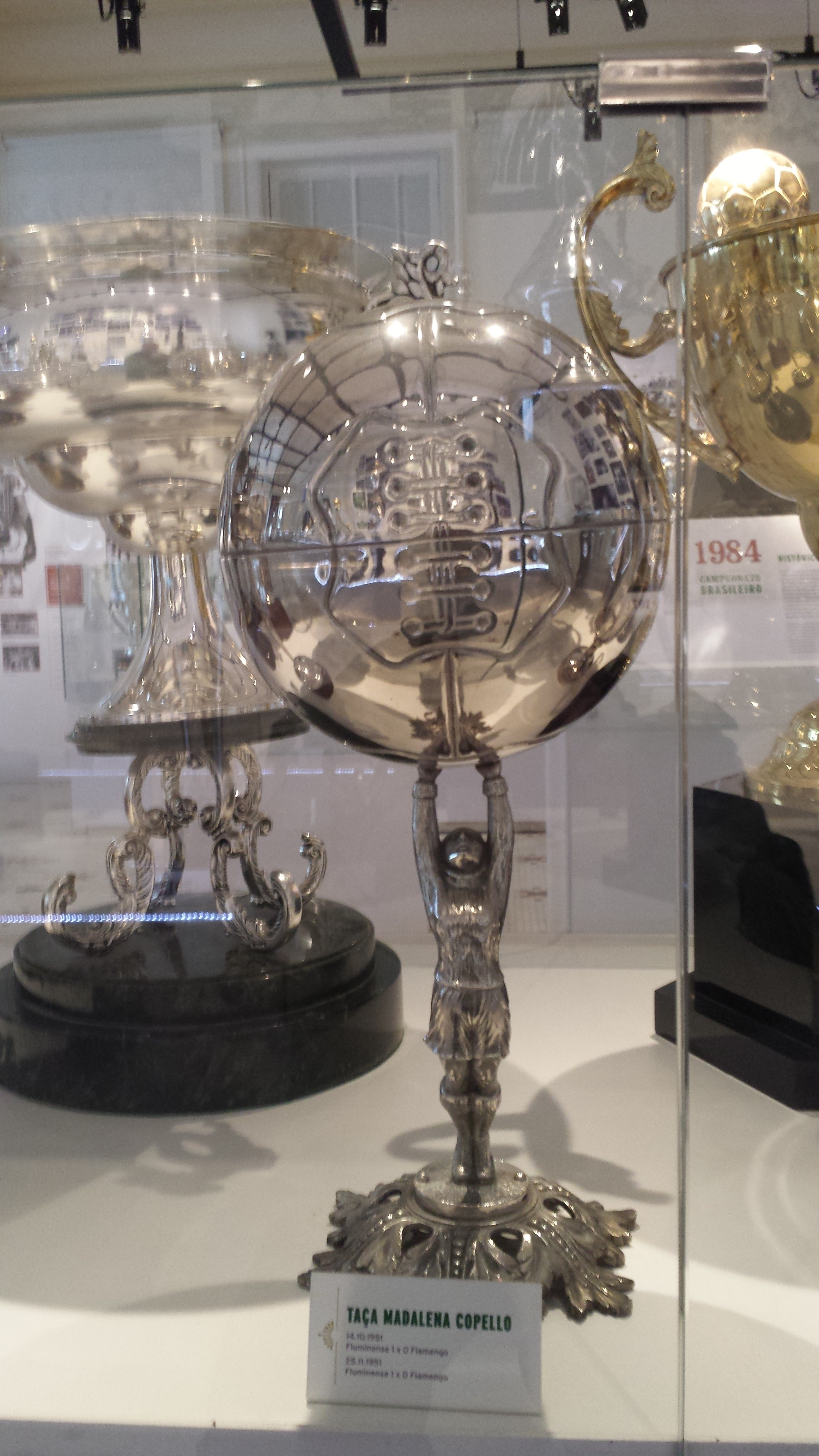 Taça Madalena Copello conquistada pelo Fluminense FC em 1951 em disputa contra o Flamengo no Estado do Ceará.